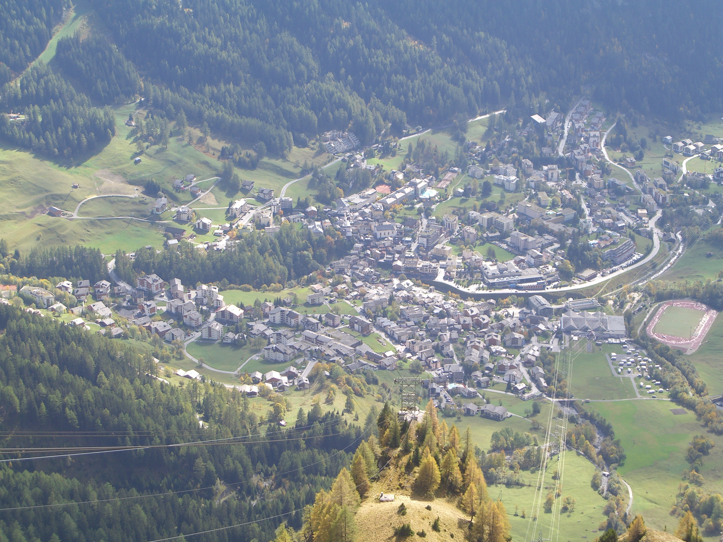 Leukerbad